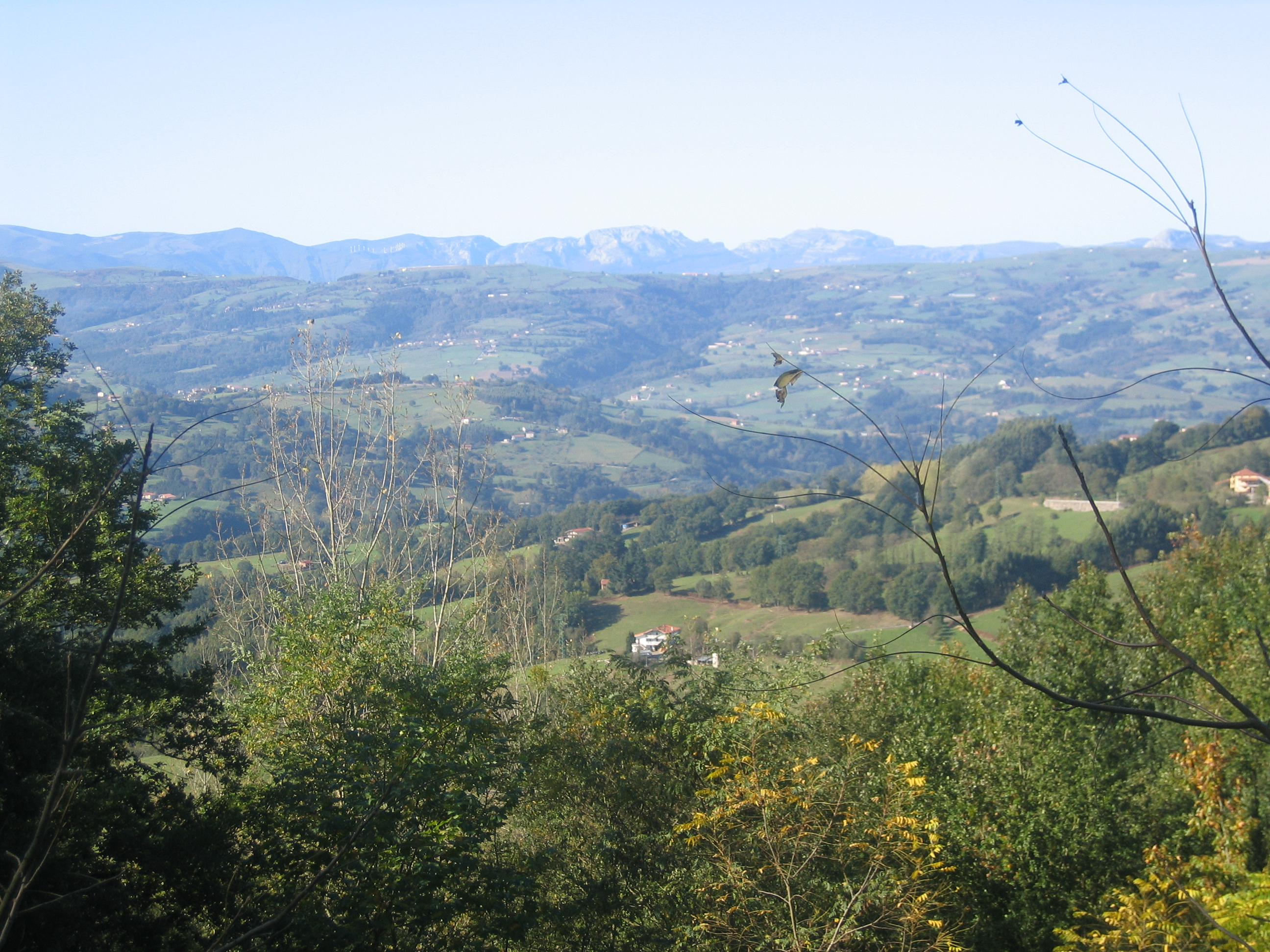 Valle de Carranza (Vizcaya)